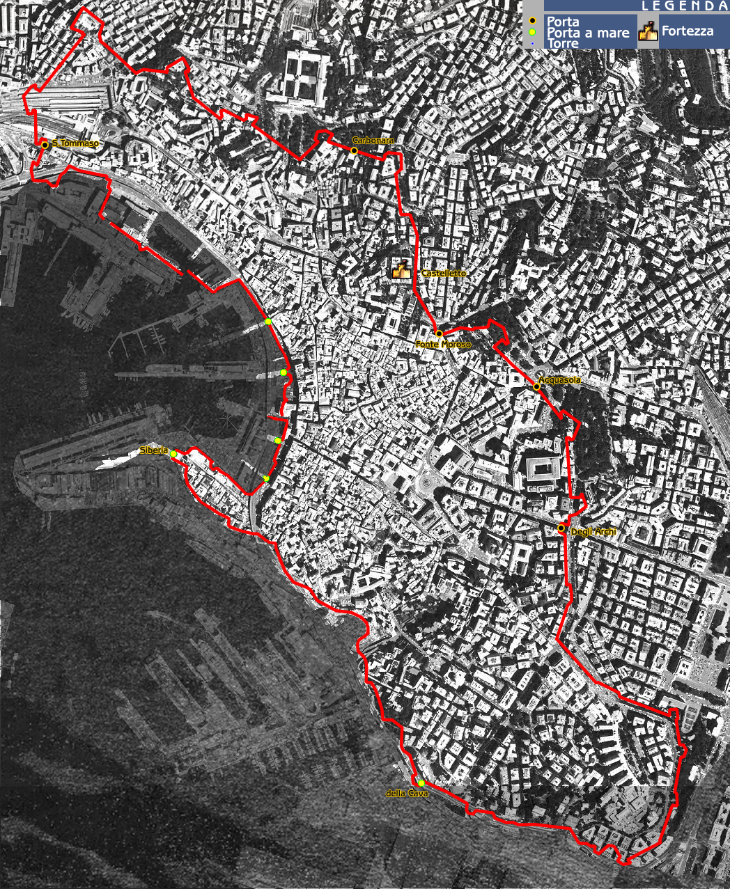 Murallas de Génova